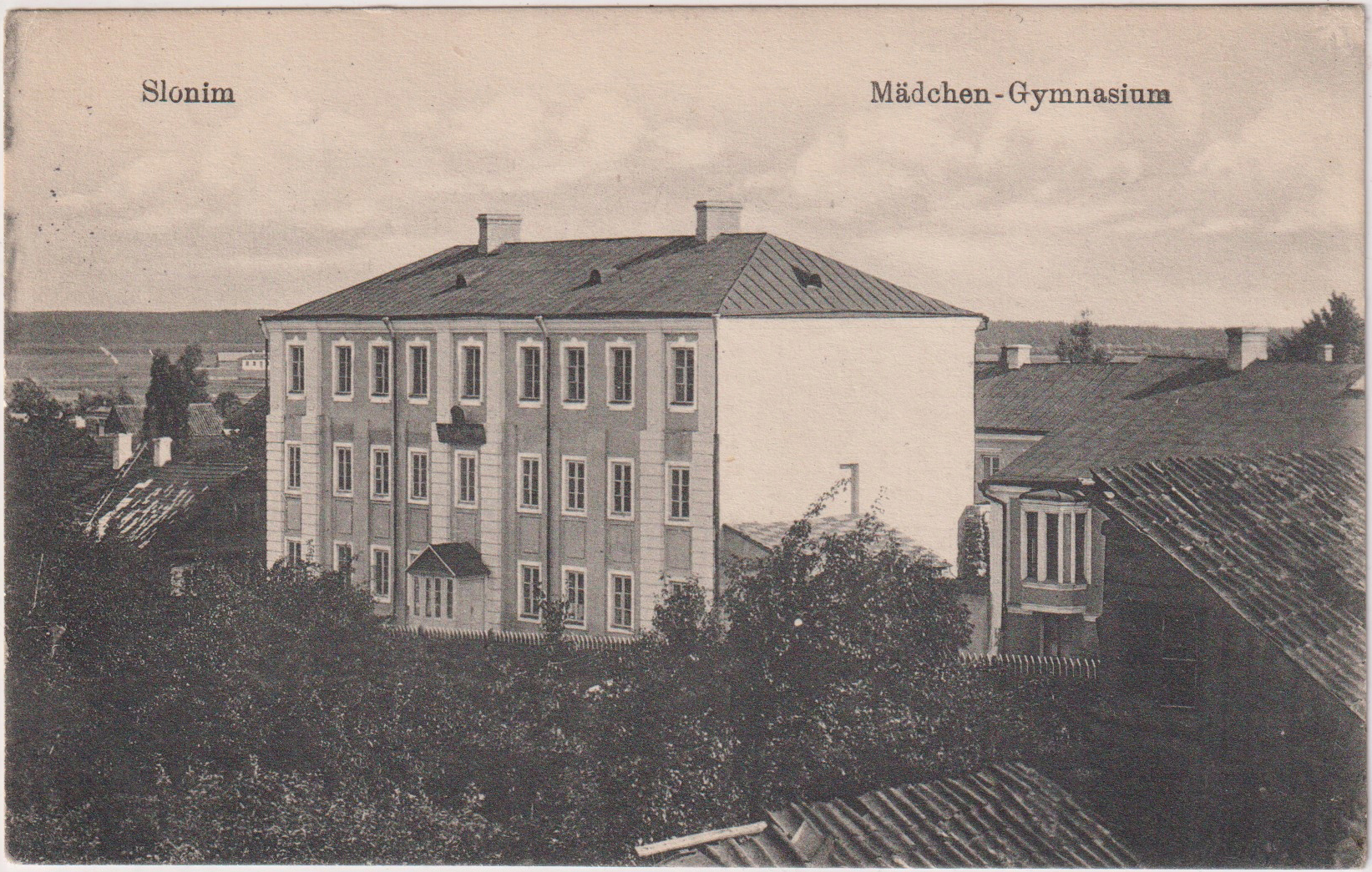 Беларуская (тарашкевіца): Слонім (Słonim). Аўстэрыя пры палацы Агінскіх (Aginski)